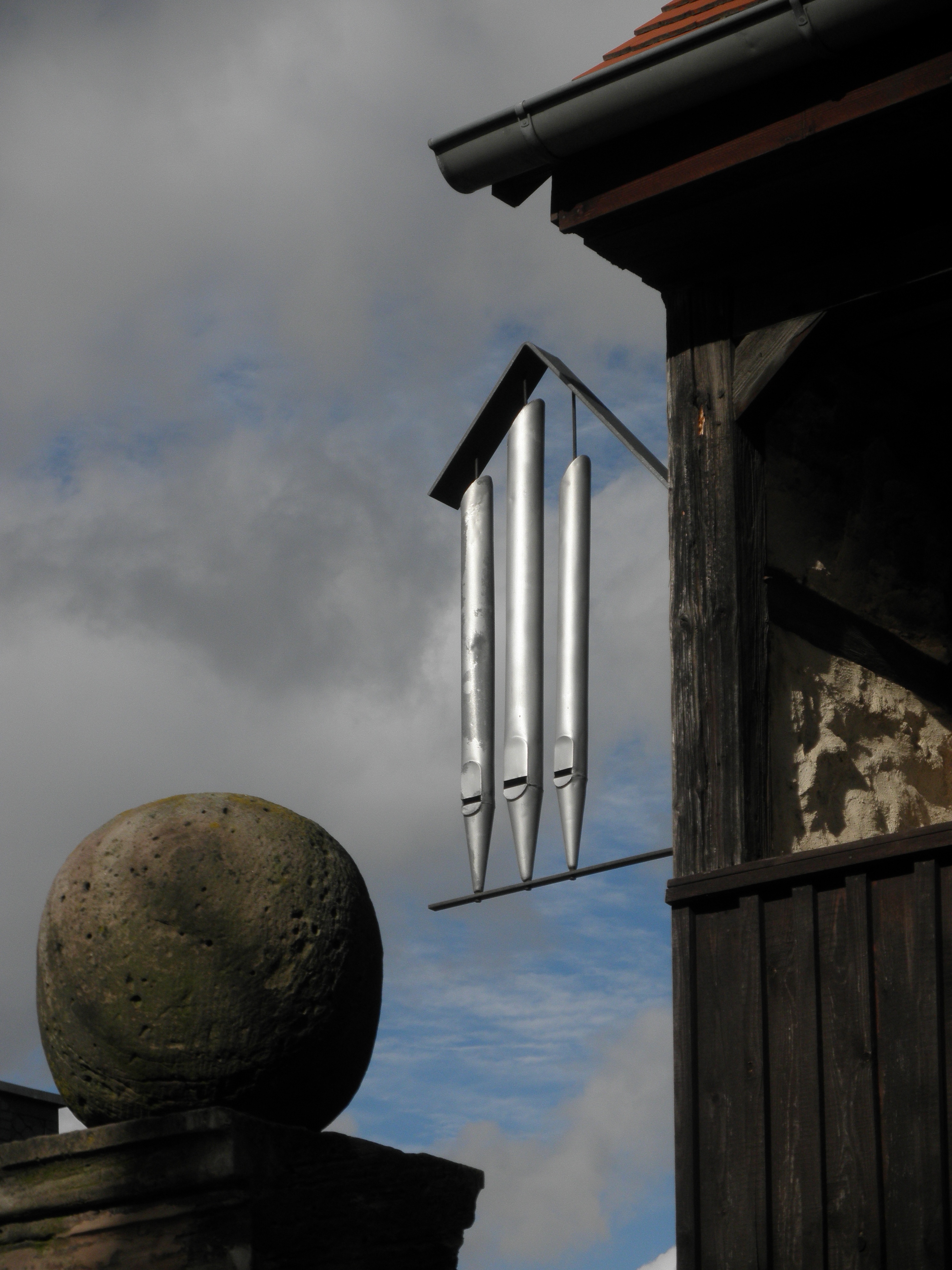 Orgelmuseum, Detail